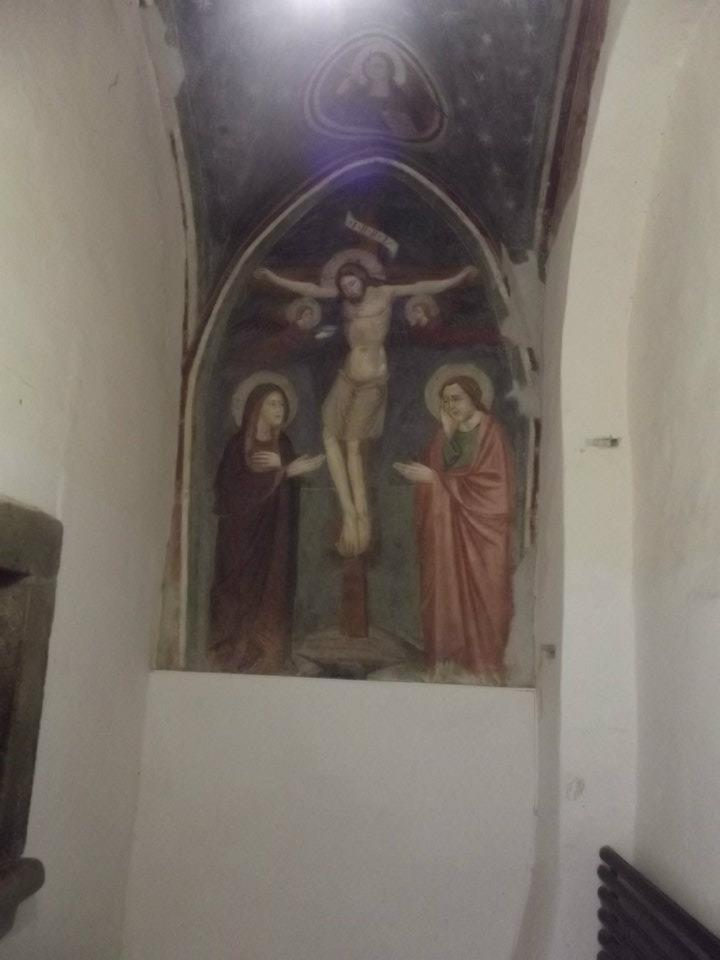 Chiesa e Convento di Sant'Anna